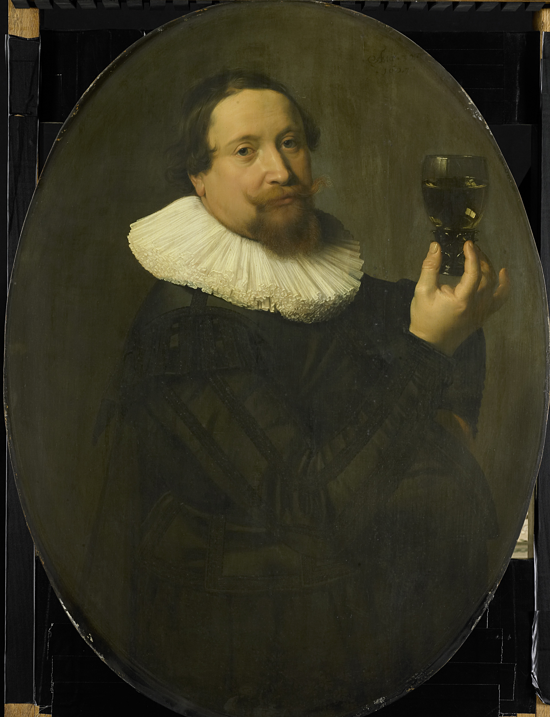 Ovale portret van Maerten Rey (1595/96-1632). Wijnkoper en kastelein van de Voetboogdoelen. Ten halven lijve, naar rechts, in de rechterhand houdt hij een roemer met witte wijn omhoog. Pendant van SK-A-699.